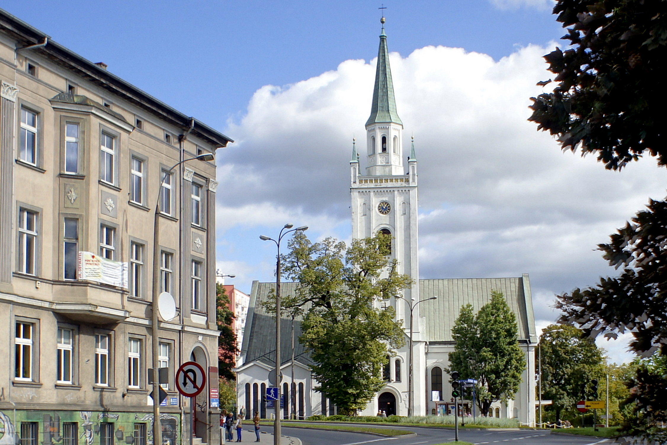 Gorzów Wielkopolski, kościół ewangelicki "Zgody", ob. rzym.-kat. p.w. św. Stanisława, 1776, 1864, 1979